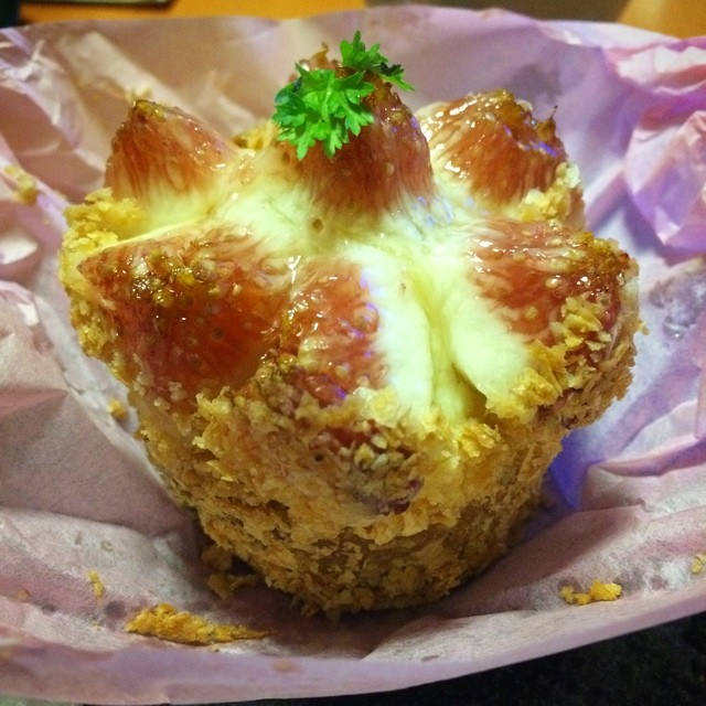 いちじくのパニエ fig of panier. #cake